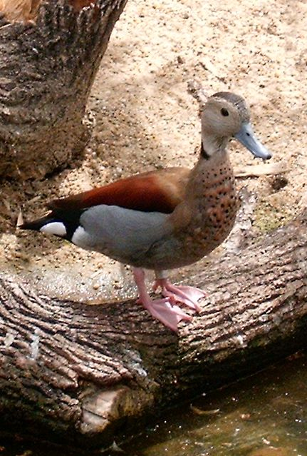 Male Callonetta leucophrys, Budapest Zoo